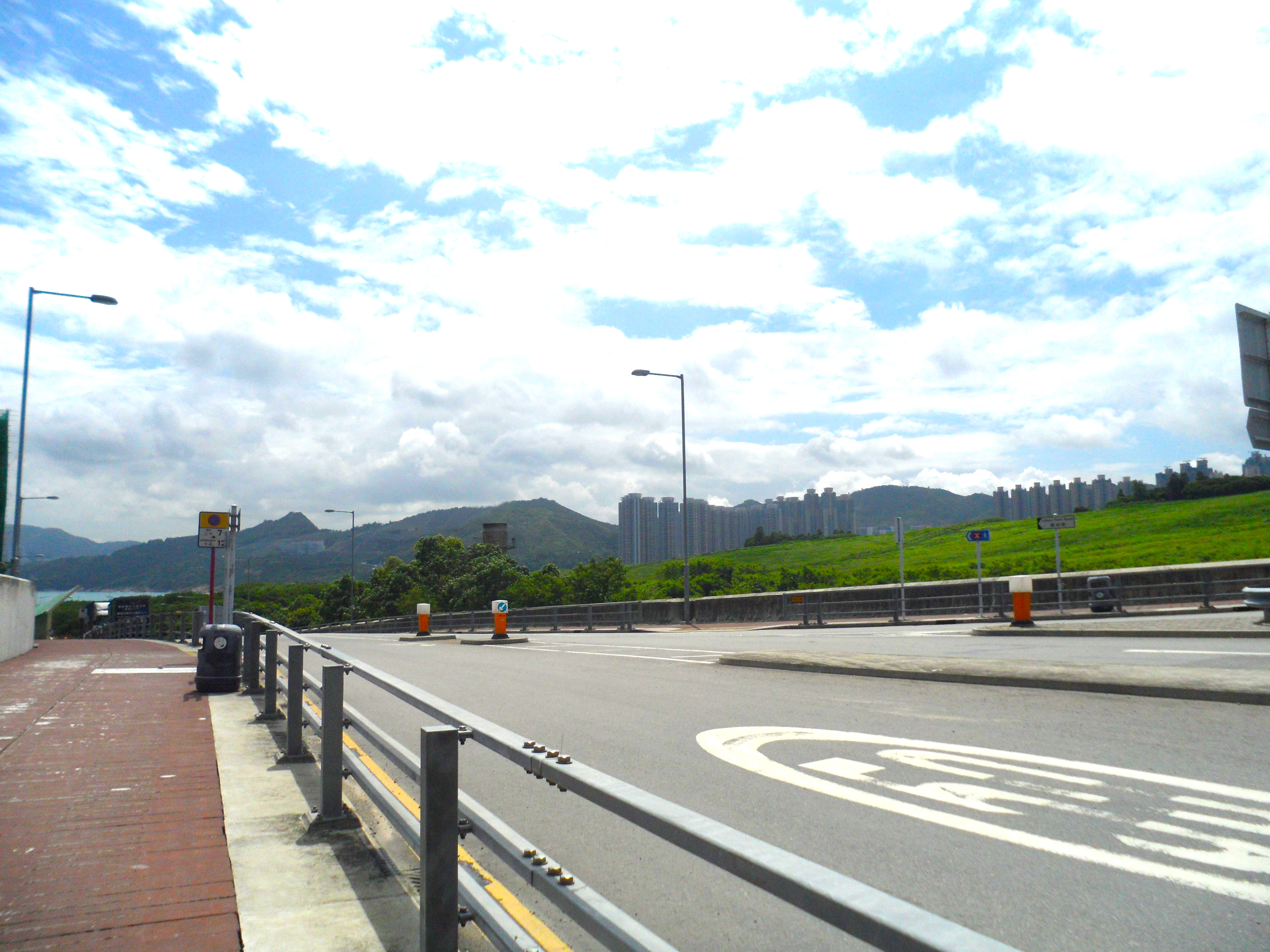 康城路的入口